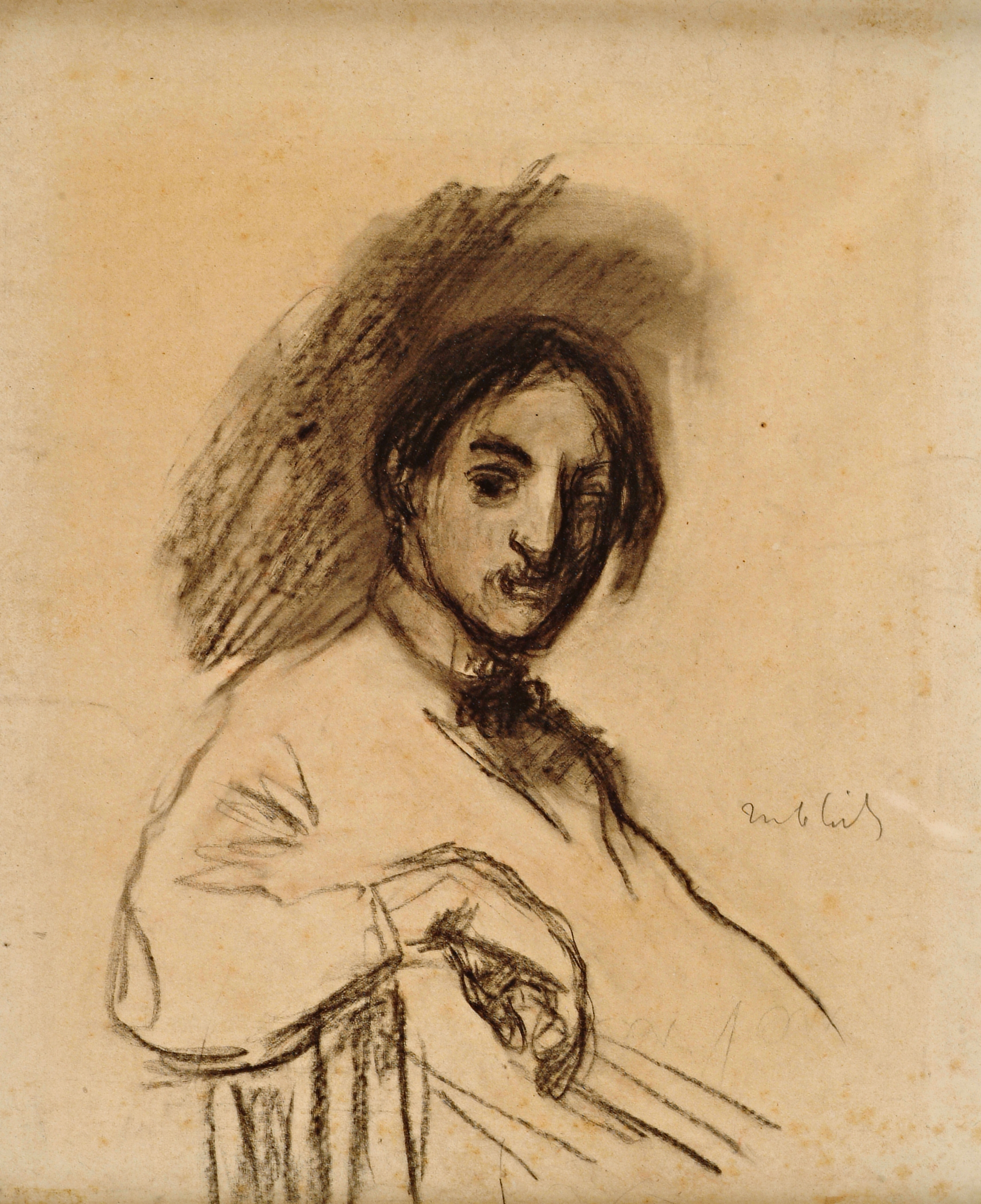 tekening ( Jakob Smits ( Jakob Smits Museum (